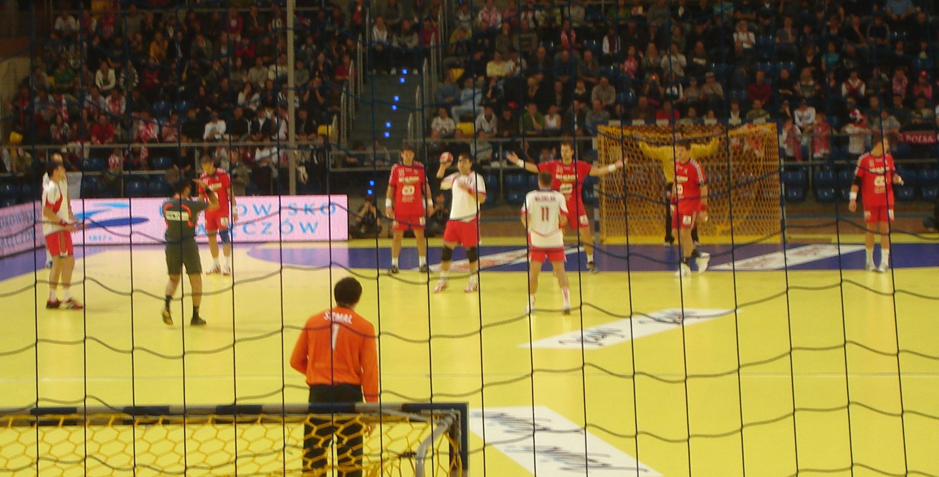 Turniej Reprezentacji Narodowych w piłce ręcznej mężczyzn 2009, mecz Polska-Czechy, Kalisz, Winiary Arena, 28 października 2009